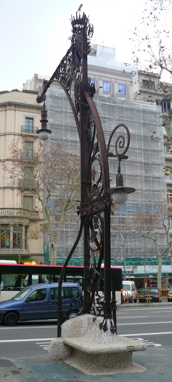 Banc-fanal del passeig de Gràcia, de l'arquitecte modernista Pere Falqués (1906)